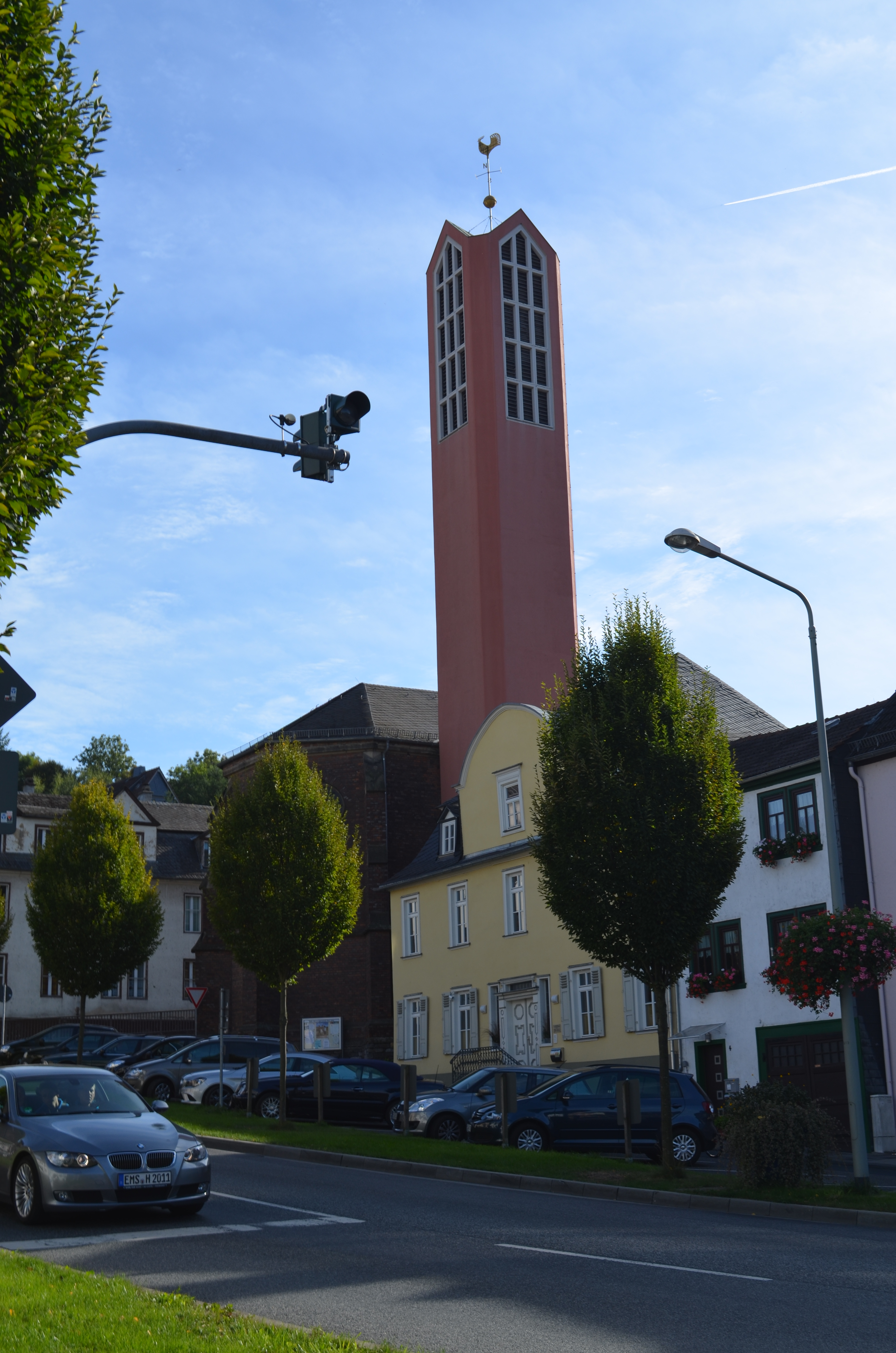 Diez, Herz-Jesu-Kirche, im Vordergrund in gelb Ernst-Scheuern-Platz 6